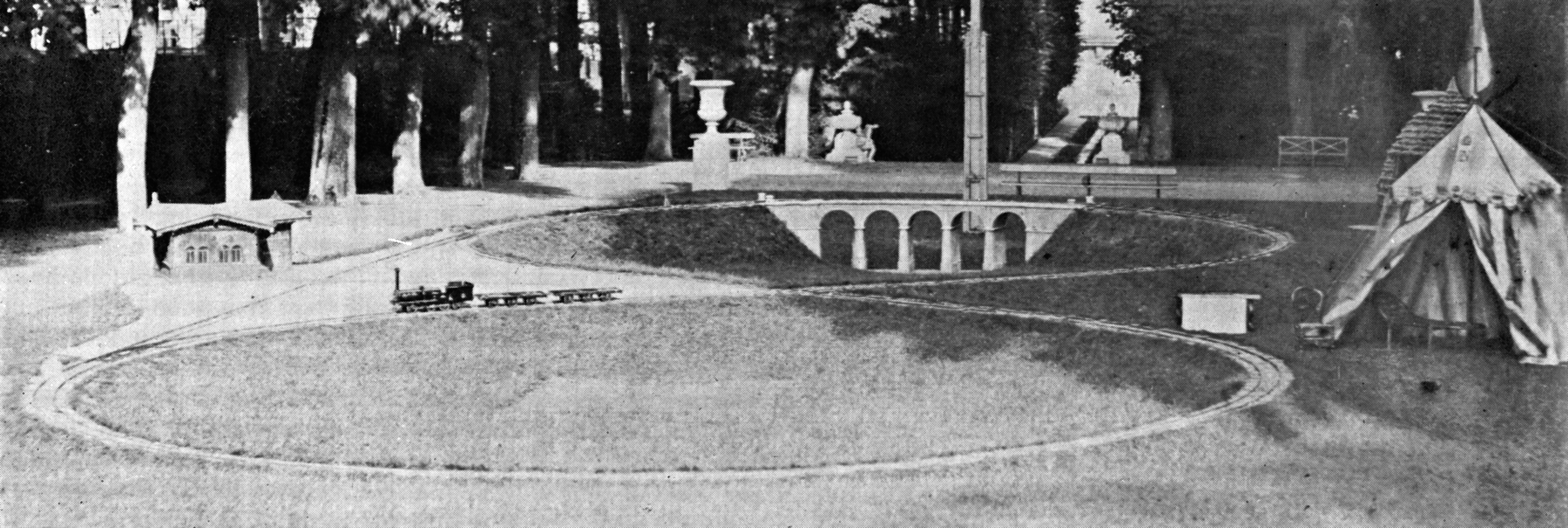 Die Eisenbahn des kaiserlichen Prinzen im Park von Schloss Saint-Cloud